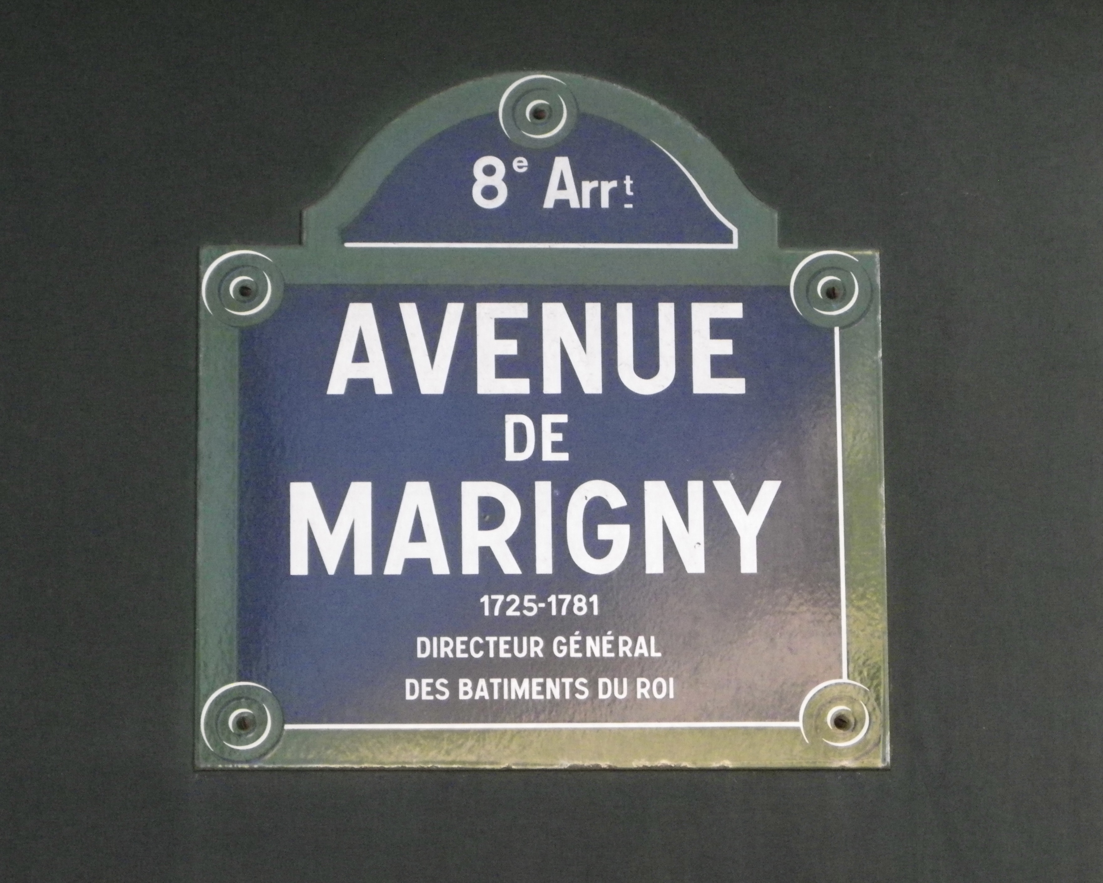 Plaque de l'avenue de Marigny, dans le 8e arrondissement de Paris